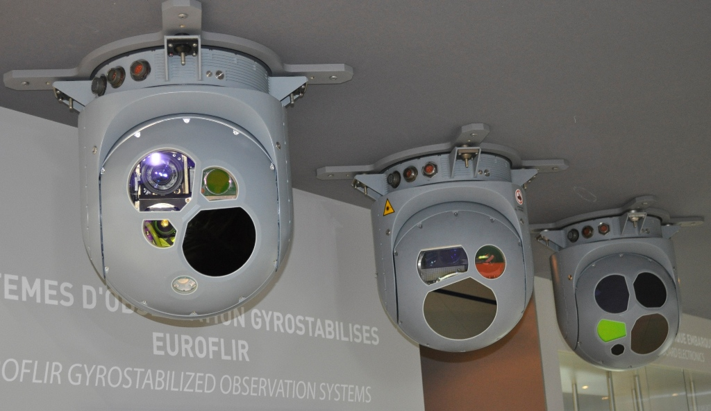 Systèmes d'observation gyrostabilisés Euroflir, exposés au salon du Bourget 2011 ; stand Safran ; société Sagem Défense Sécurité